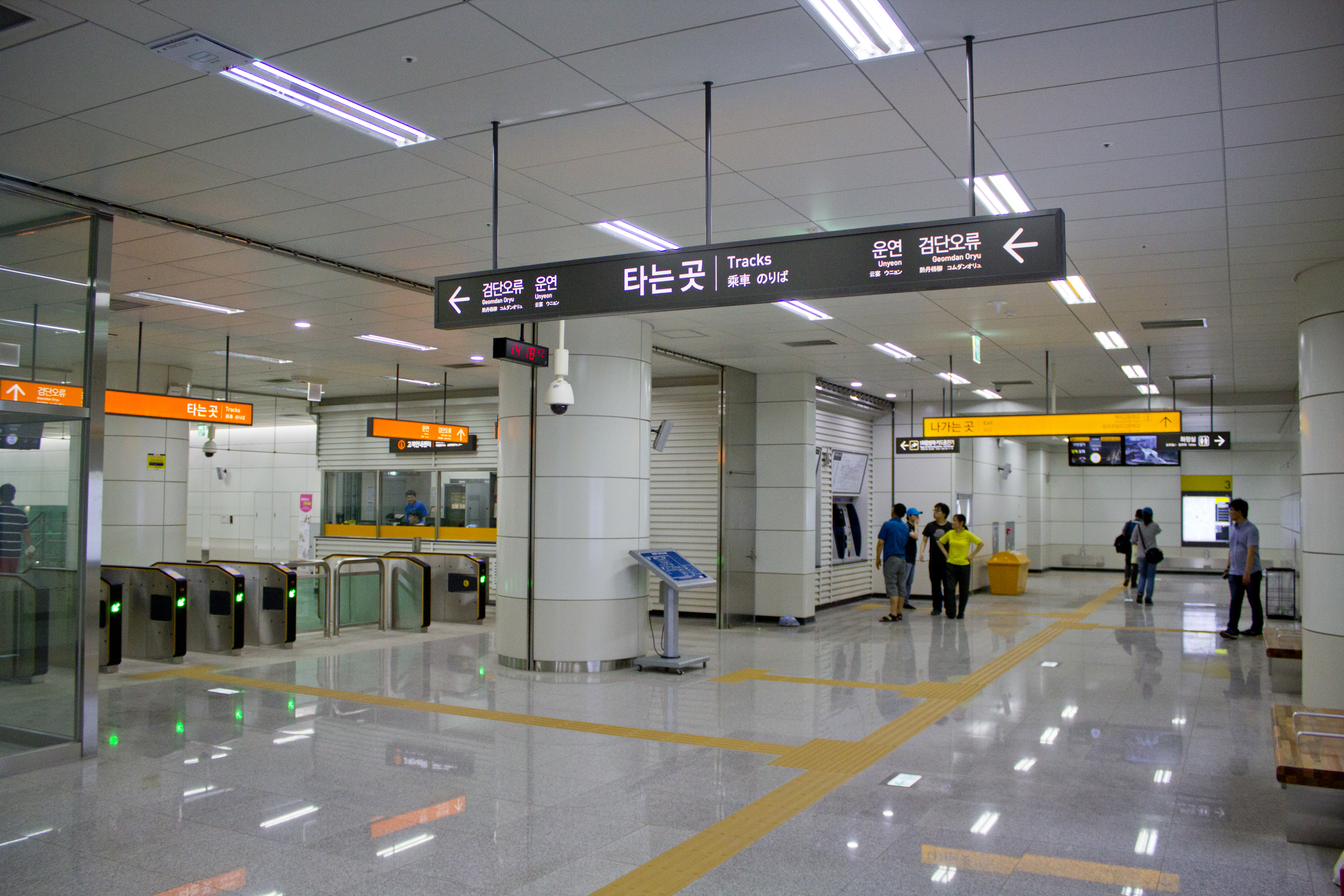 인천2호선 독정역 맞이방(대합실)